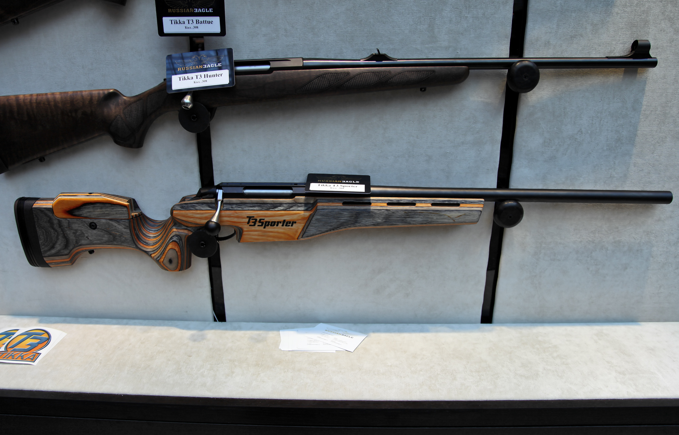 .308 Win Tikka T3 Sporter